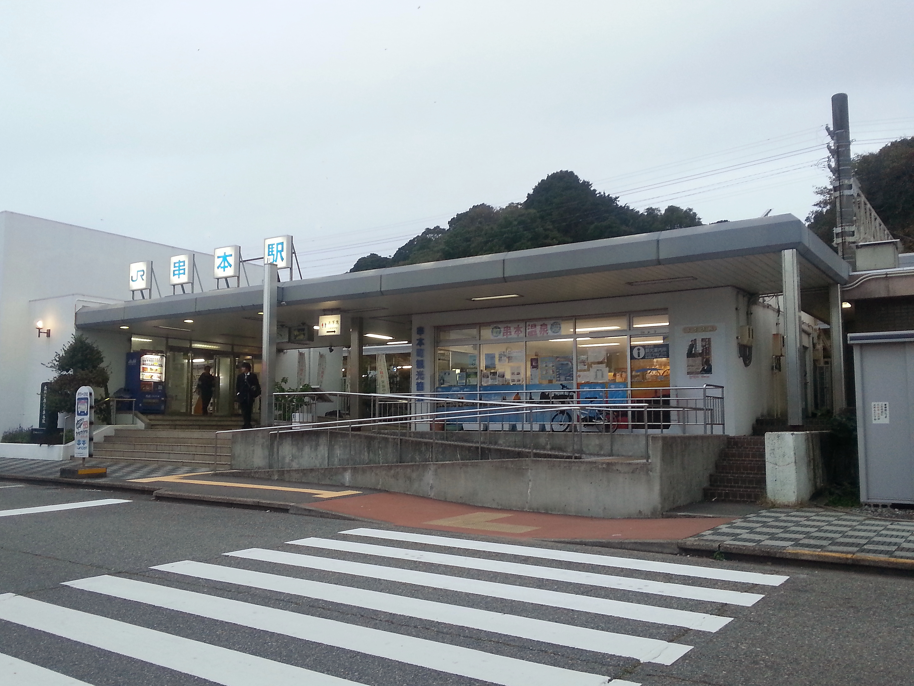 JR 串本駅